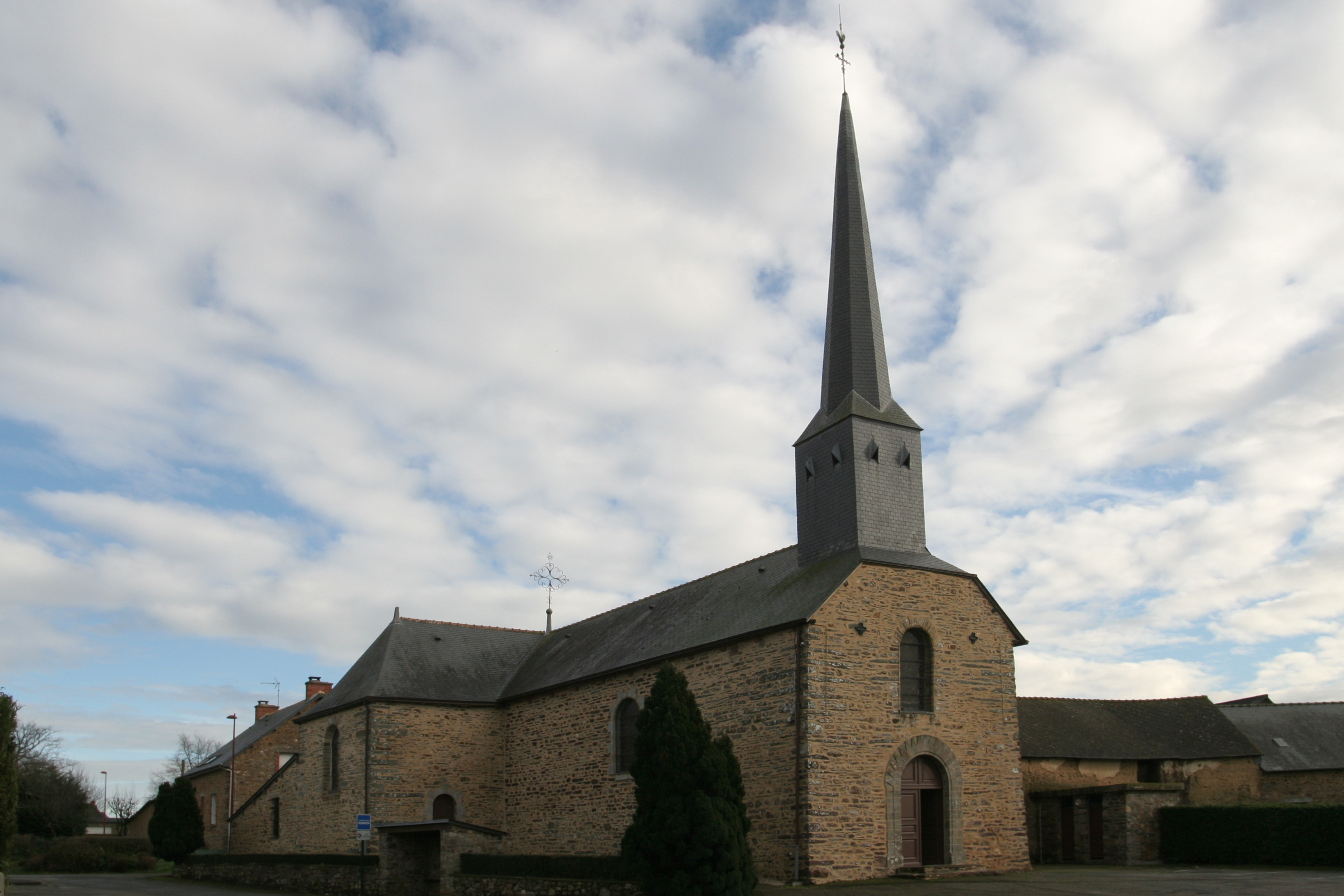 Église Saint-Étienne-Saint-Melaine des Brulais.